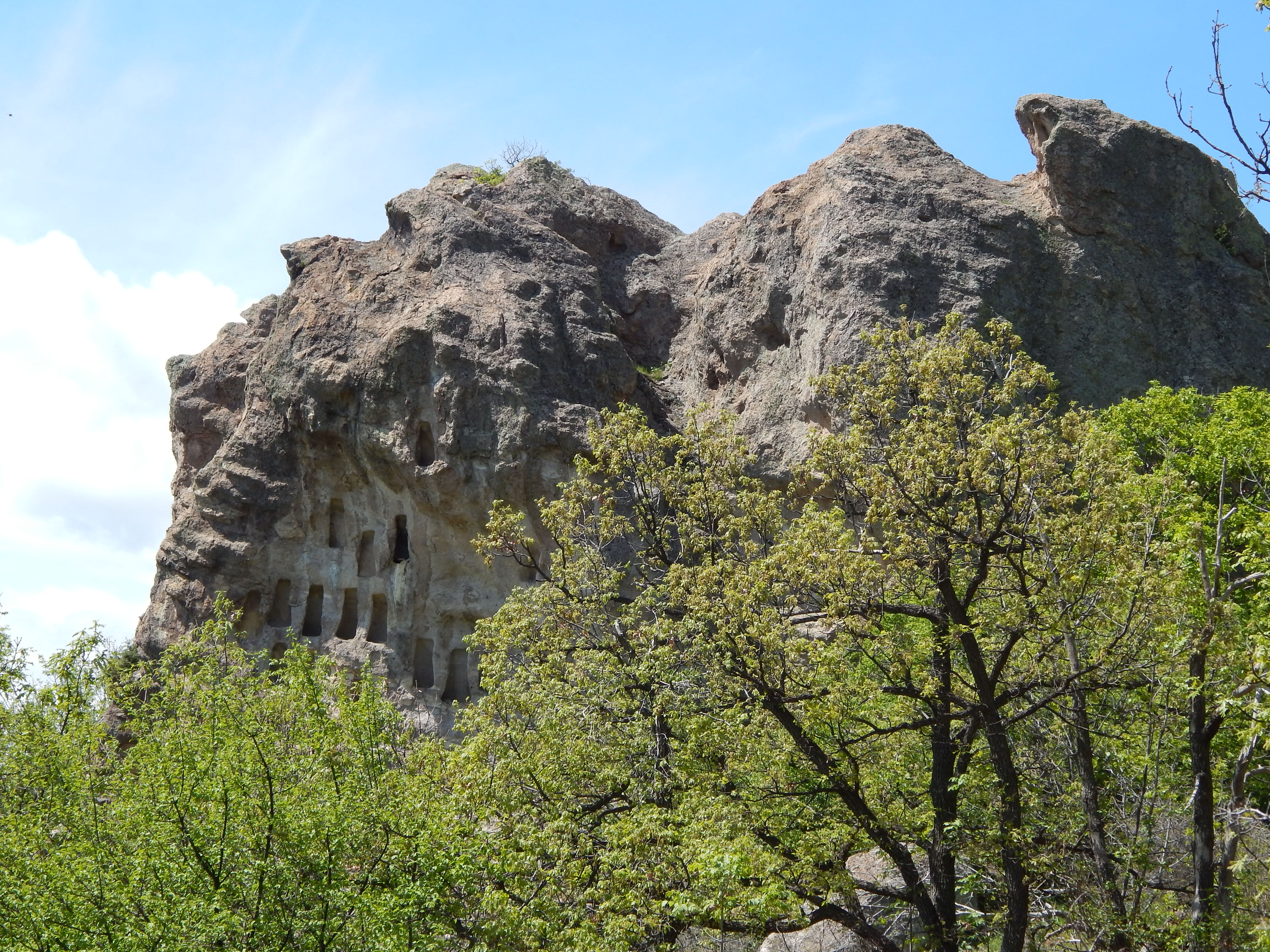 Орлови скали край с. Сърница, Хасковско с характерните за Източни Родопи трапецовидни ниши.